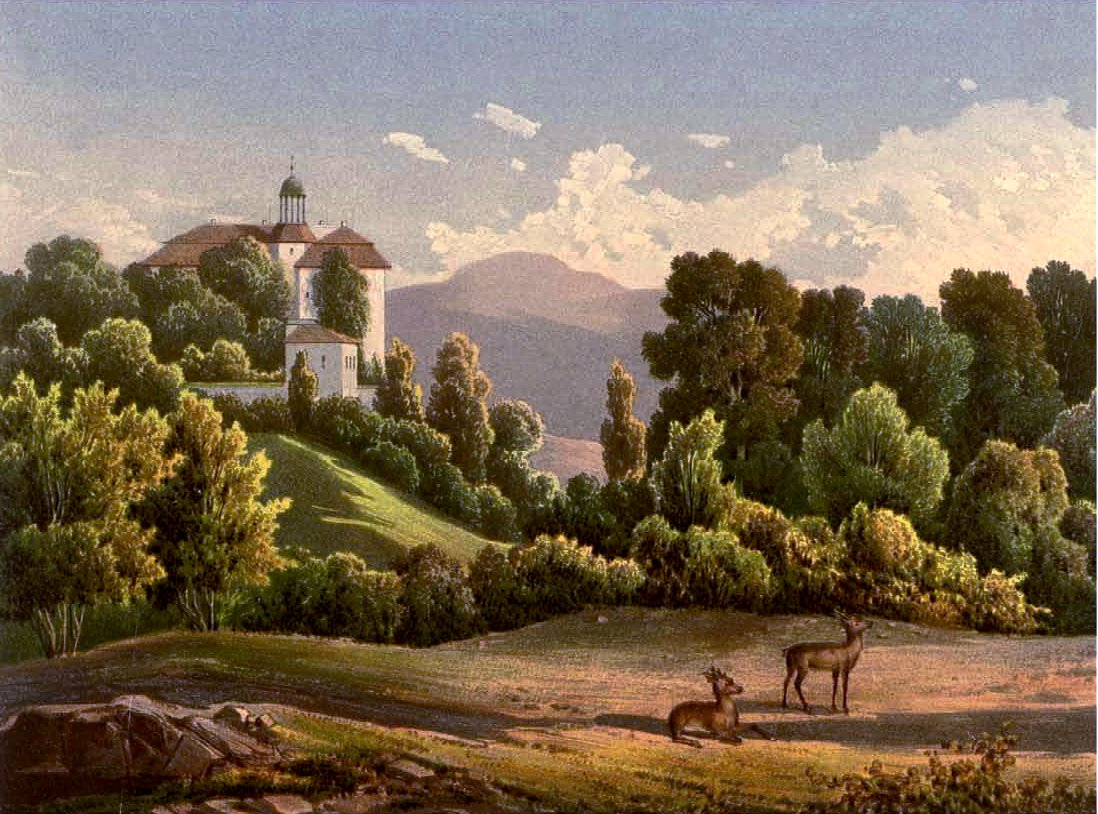 Schloss Domanze, Kreis Schweidnitz, Provinz Schlesien